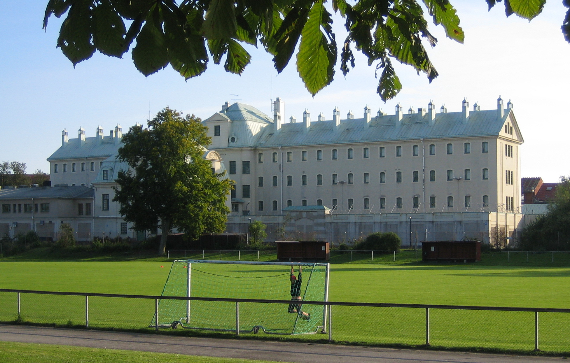 Malmö jails at Kirseberg